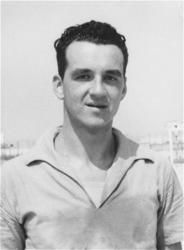 Bruno Pizzul al Catania nel 1958 quando era ancora un calciatore.